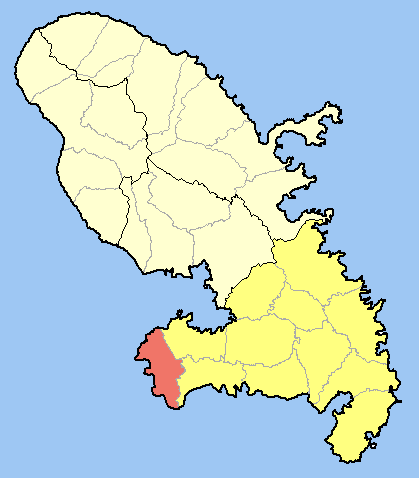 Location of Les Anses-d'Arlet within Martinique